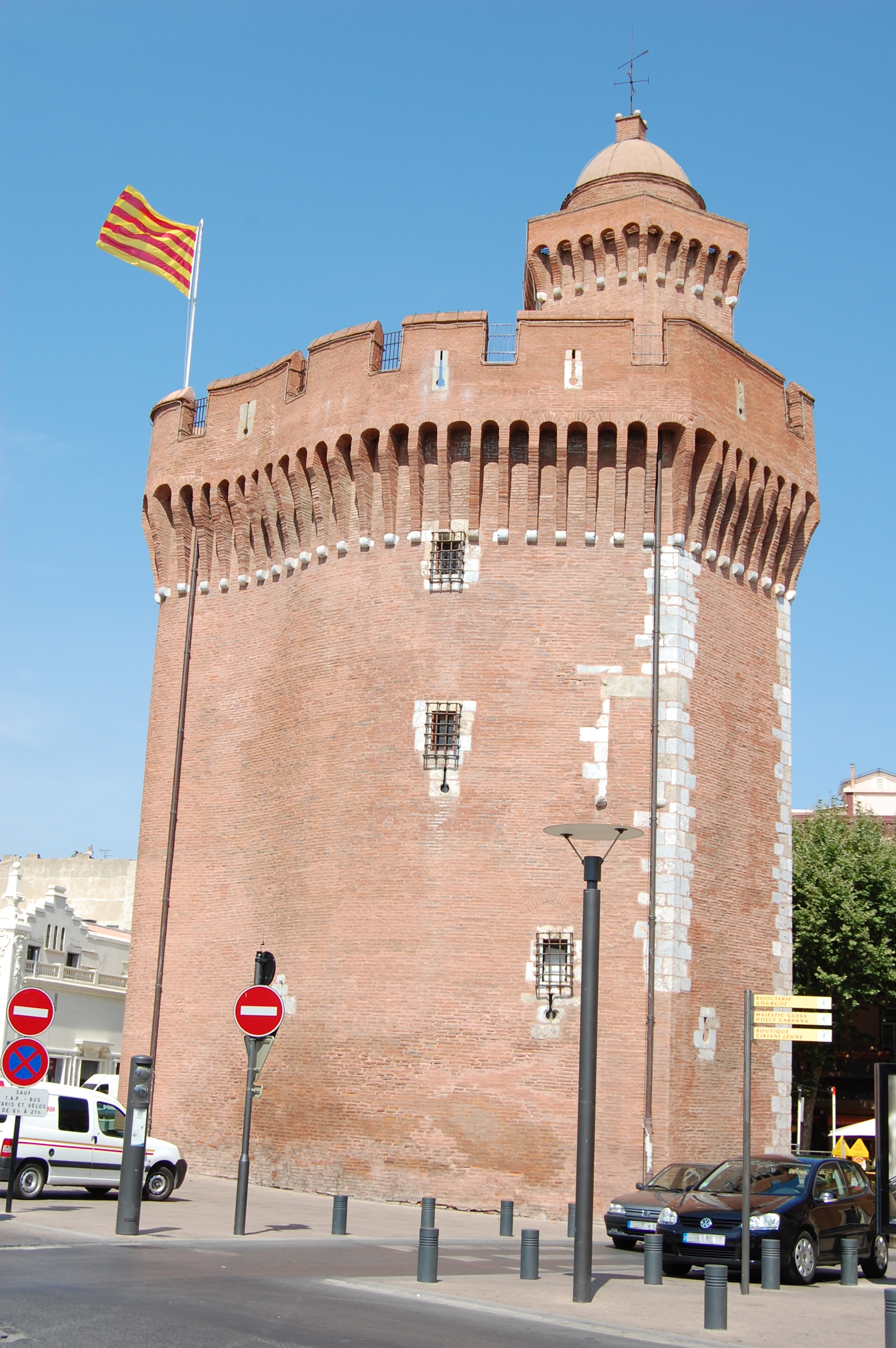 Le Castillet (El Castellet) à Perpignan. Travail personnel, sous licence CC-BY-SA-3.0. Appareil photo utilisé : Nikon D40